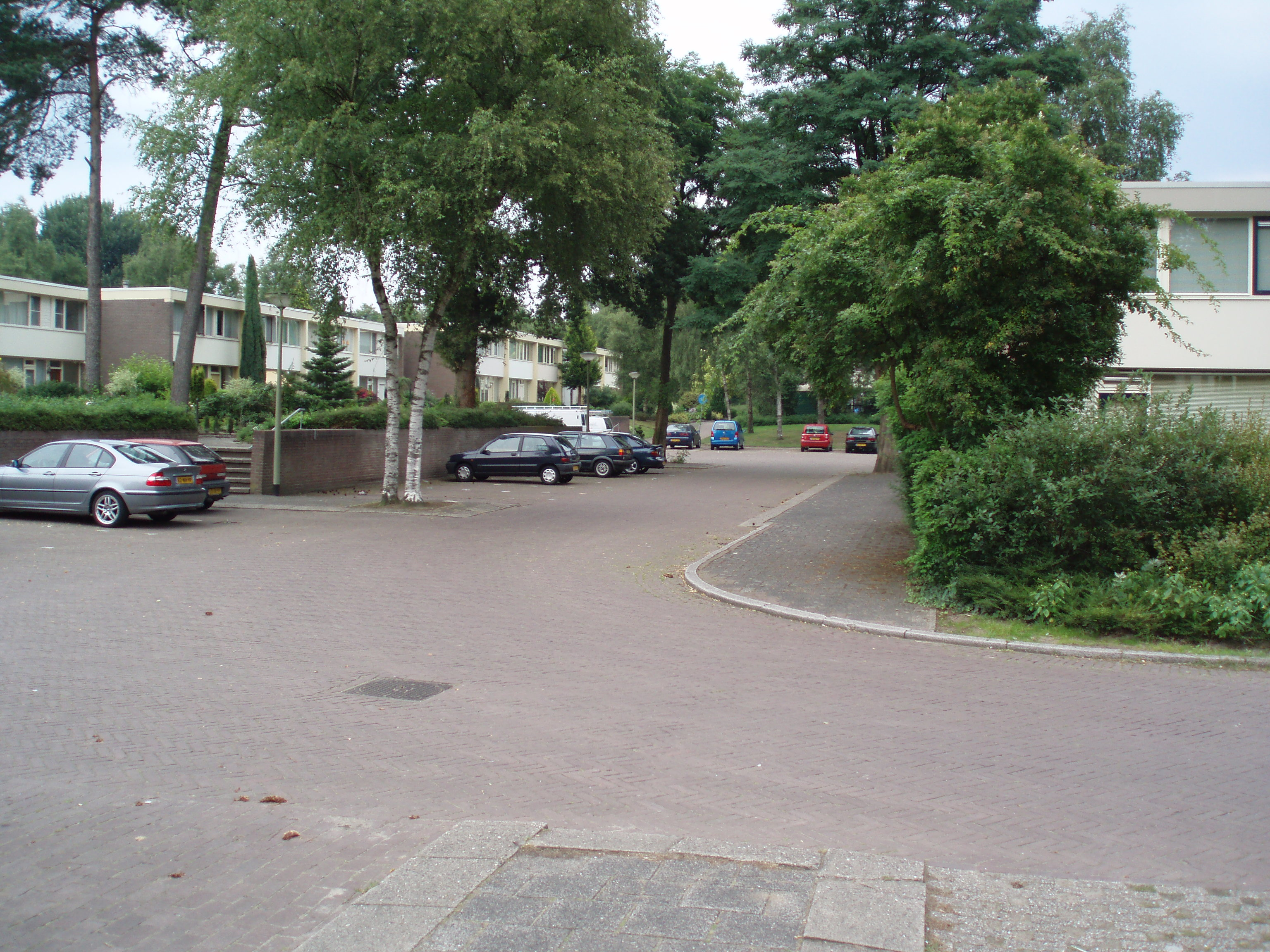 De wijk Emmerhout in Emmen